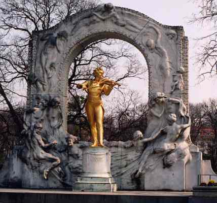 Johann Strauss denkmal, Wenen. Eigen foto.